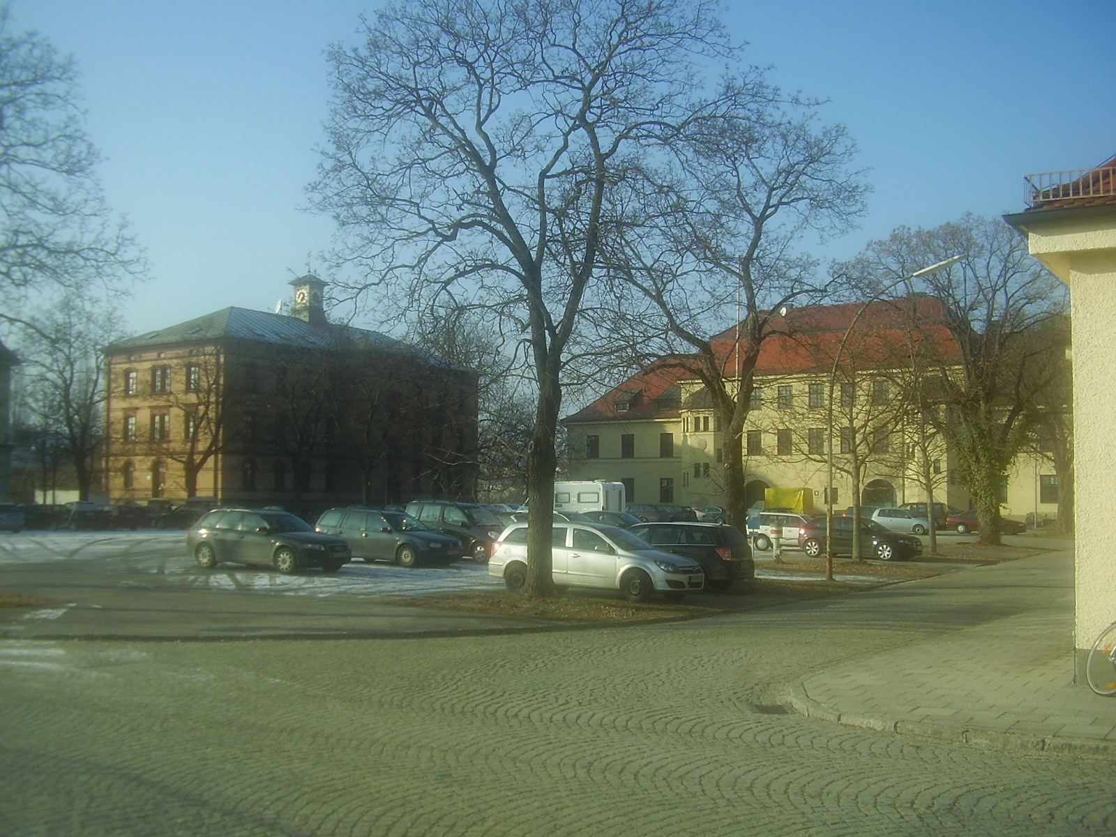 Gebäude der ehemaligen Luitpoldkaserne, München; Kasernenhof in Blickrichtung Nordwesten.